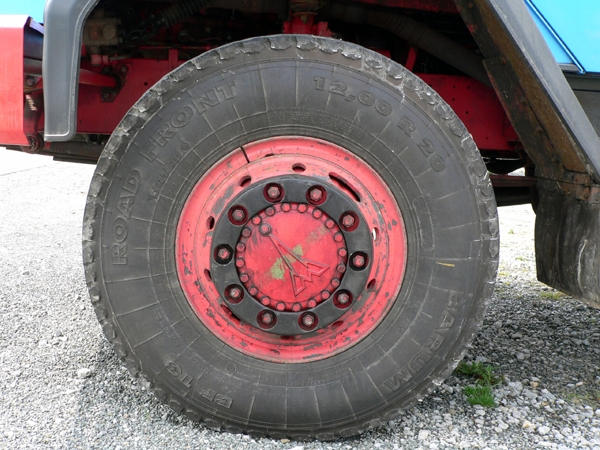 Размер покрышки Магируса - 12,00 R 20